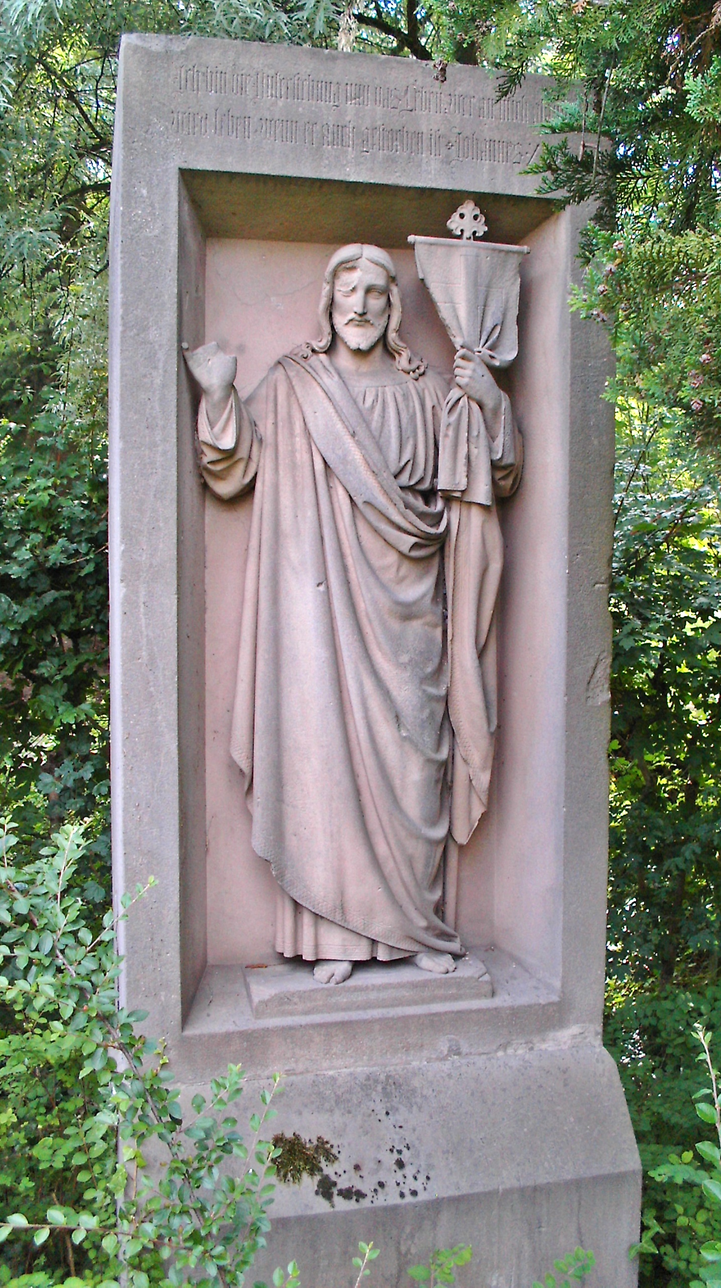 Grabstein Ludwig Freiherr von Redwitz (1779-1848), Speyer, Alter Friedhof (Vater des Dichters Oskar von Redwitz)